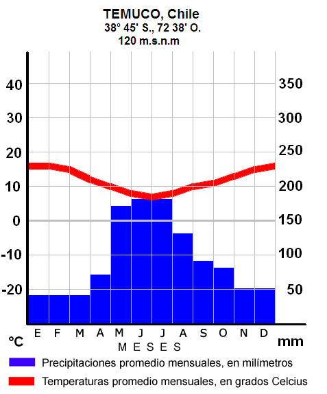 Climograma de Temuco actualizado el 2011 presentando lluvias periódicamente todo el año.